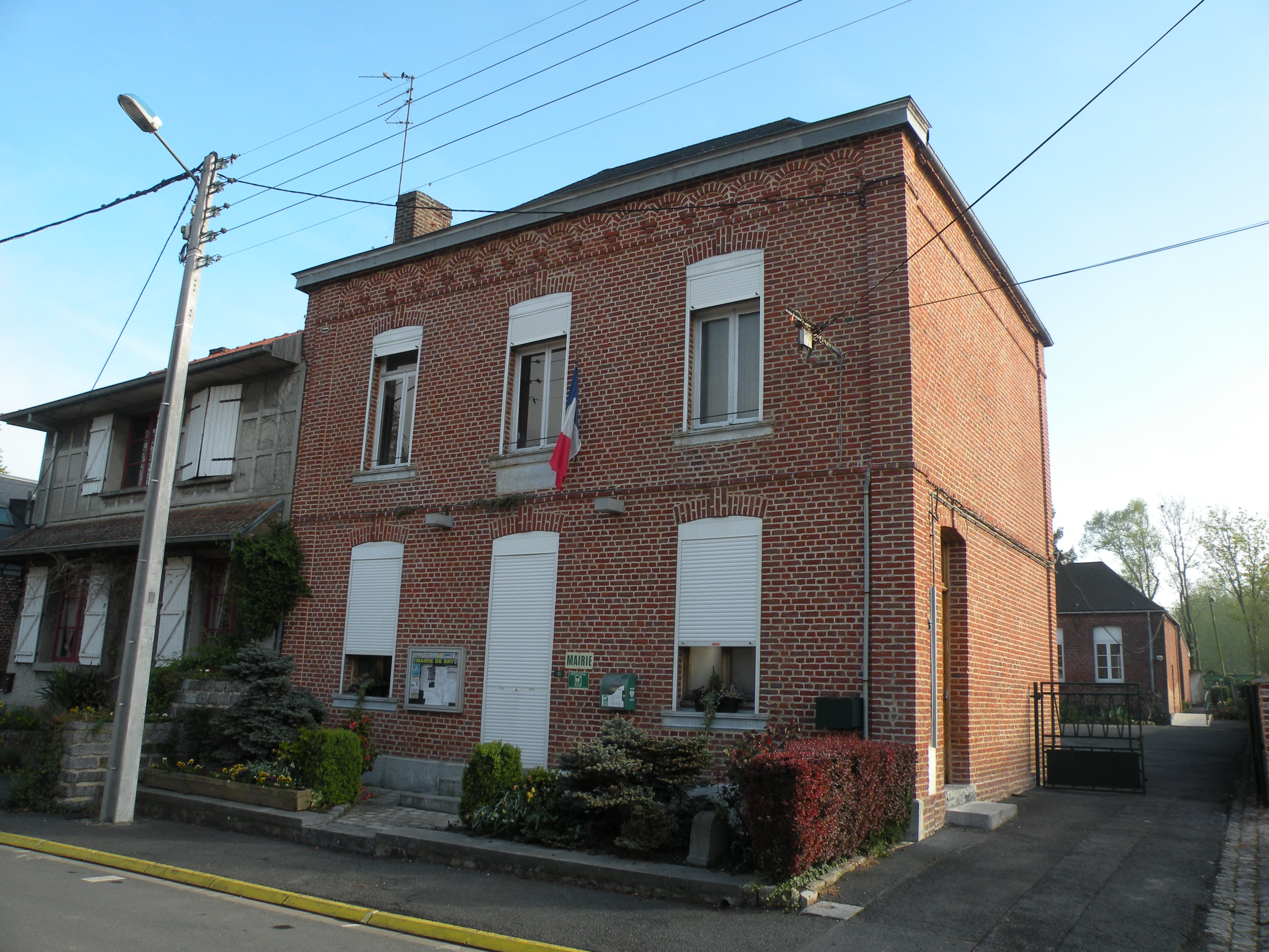 Bry (Nord)